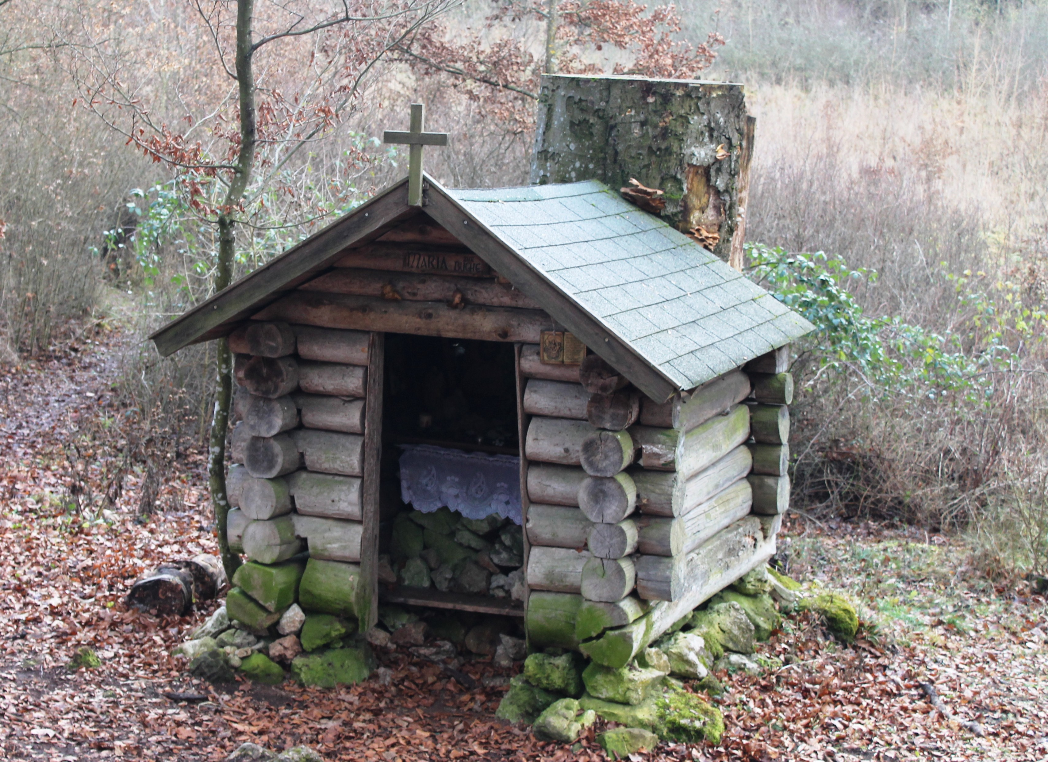 Wallfahrtskapelle im Wald bei Undorf